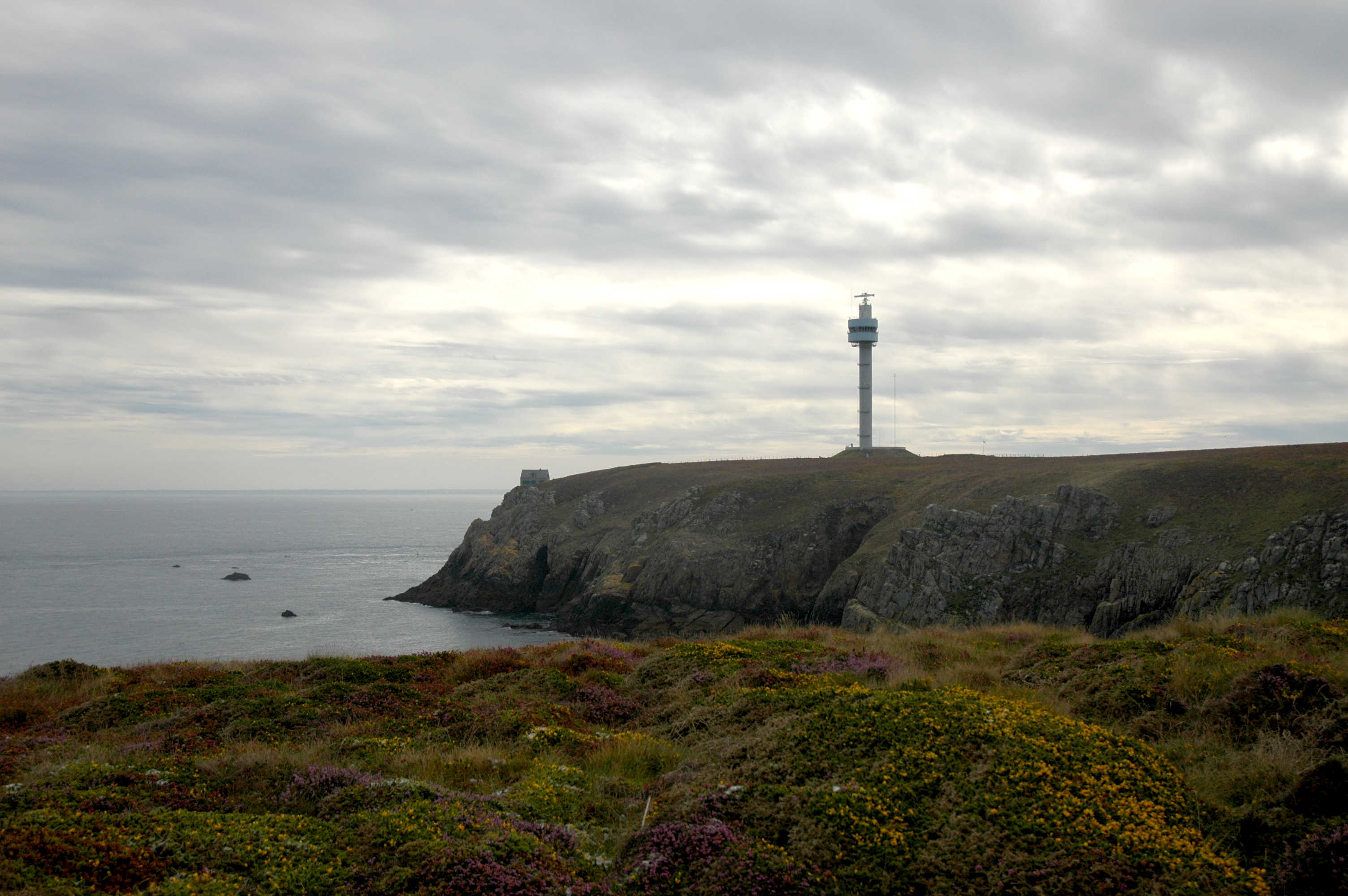 Vue de la tour radar, à proximité du phare du Stiff, Septembre 2005, île d'Ouessant, Finistère.